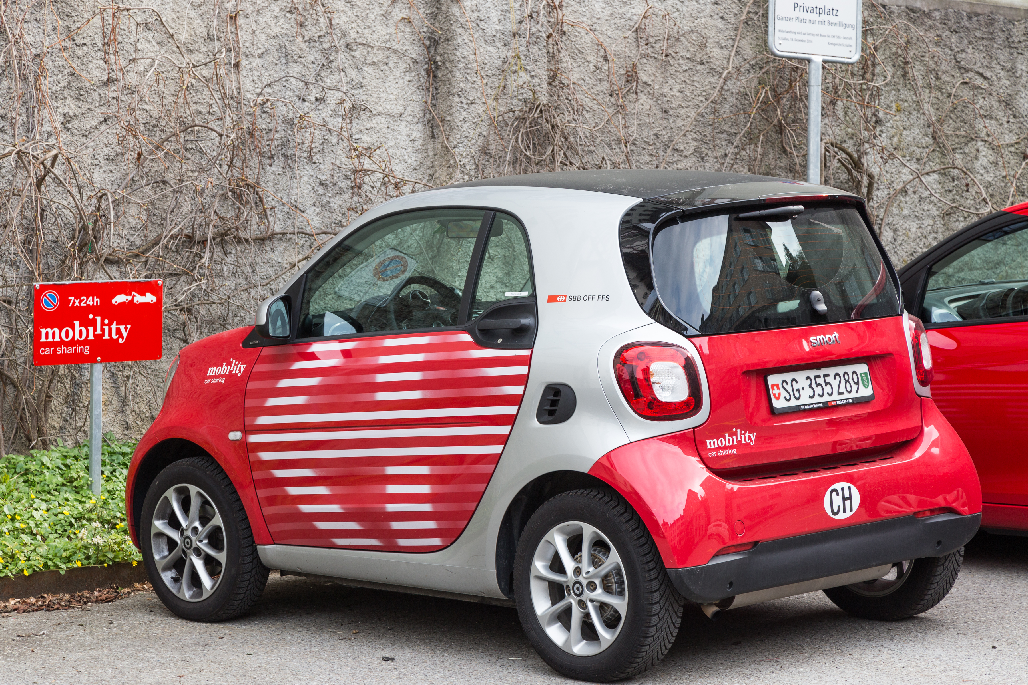 Mobility Smart auf seinem Standplatz in St. Gallen